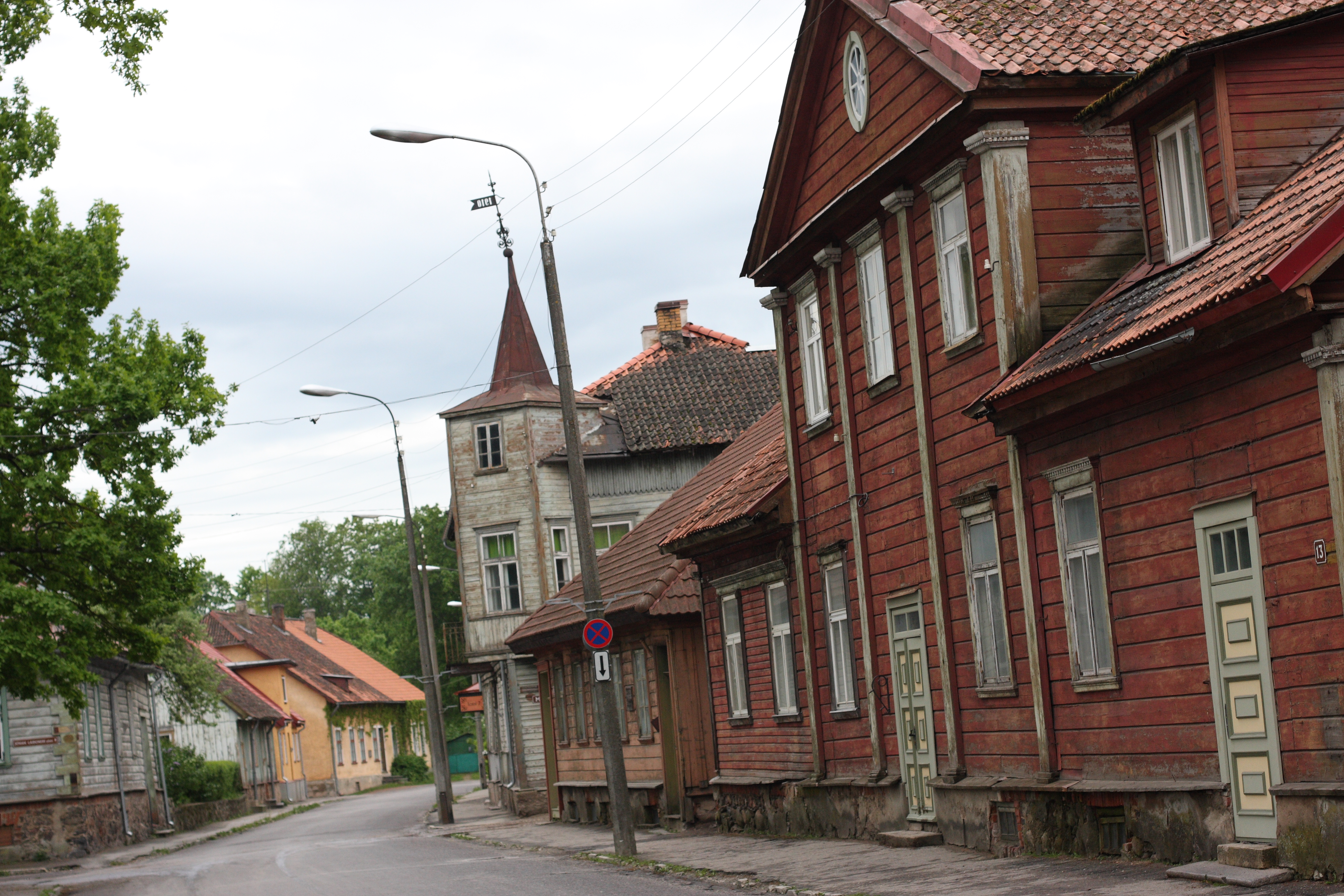 Viljandi, Estonia